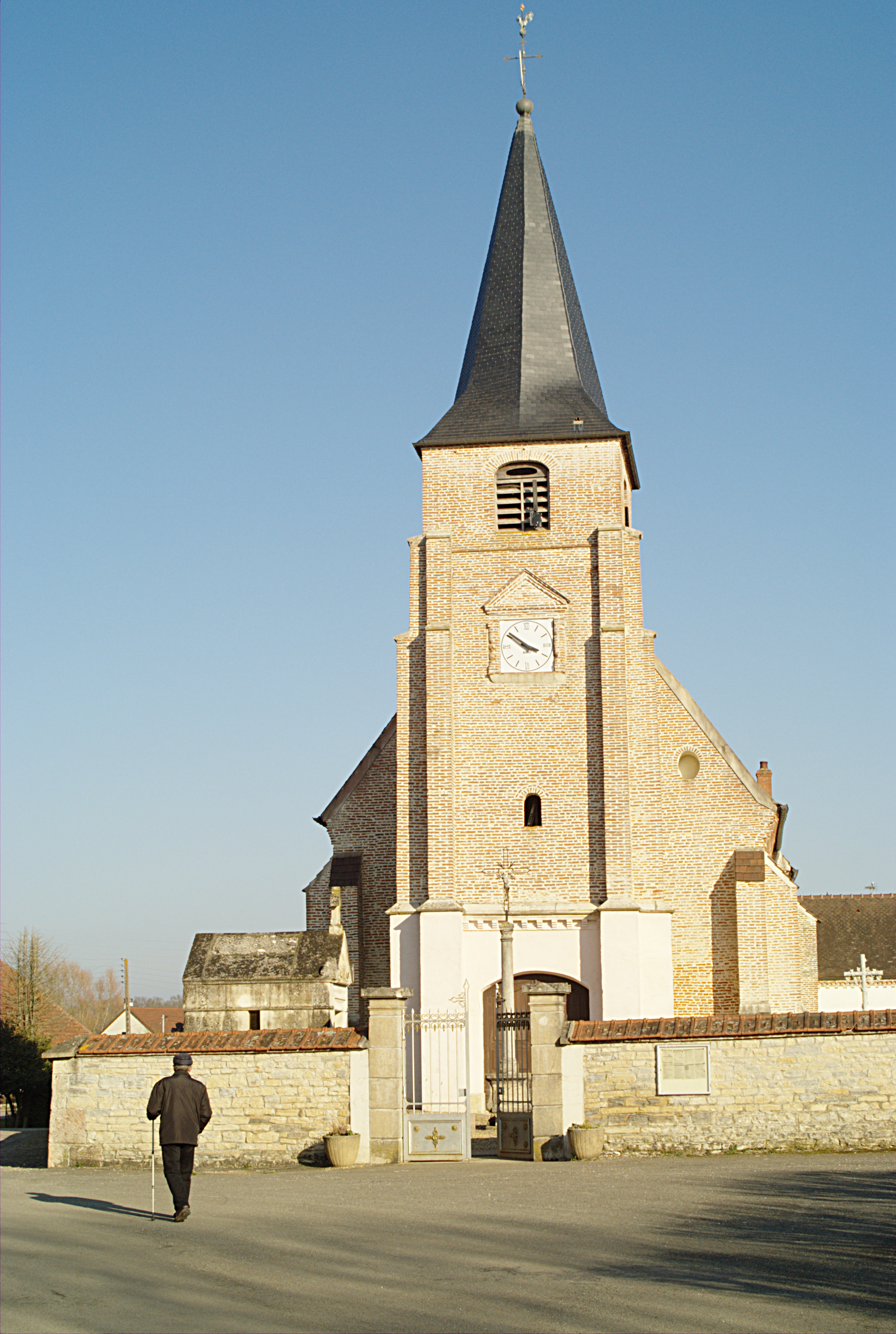 Église de la Trinité, Franxault (Côte d'Or, Bourgogne, France)